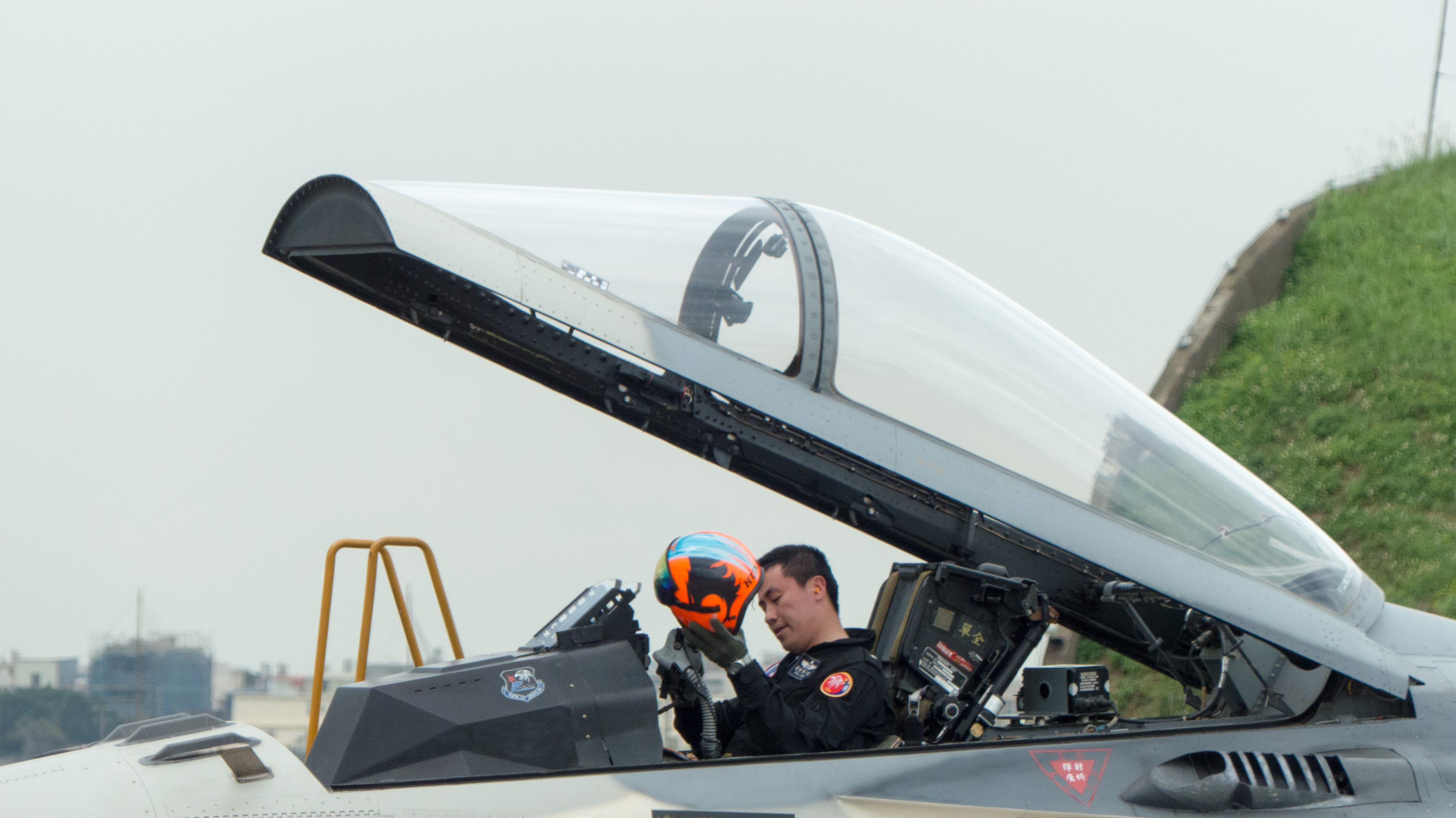 完成大任，開啟F-CK-1A 1427座艙罩後脫下頭盔的飛行員劉世博（Hunk）少校。